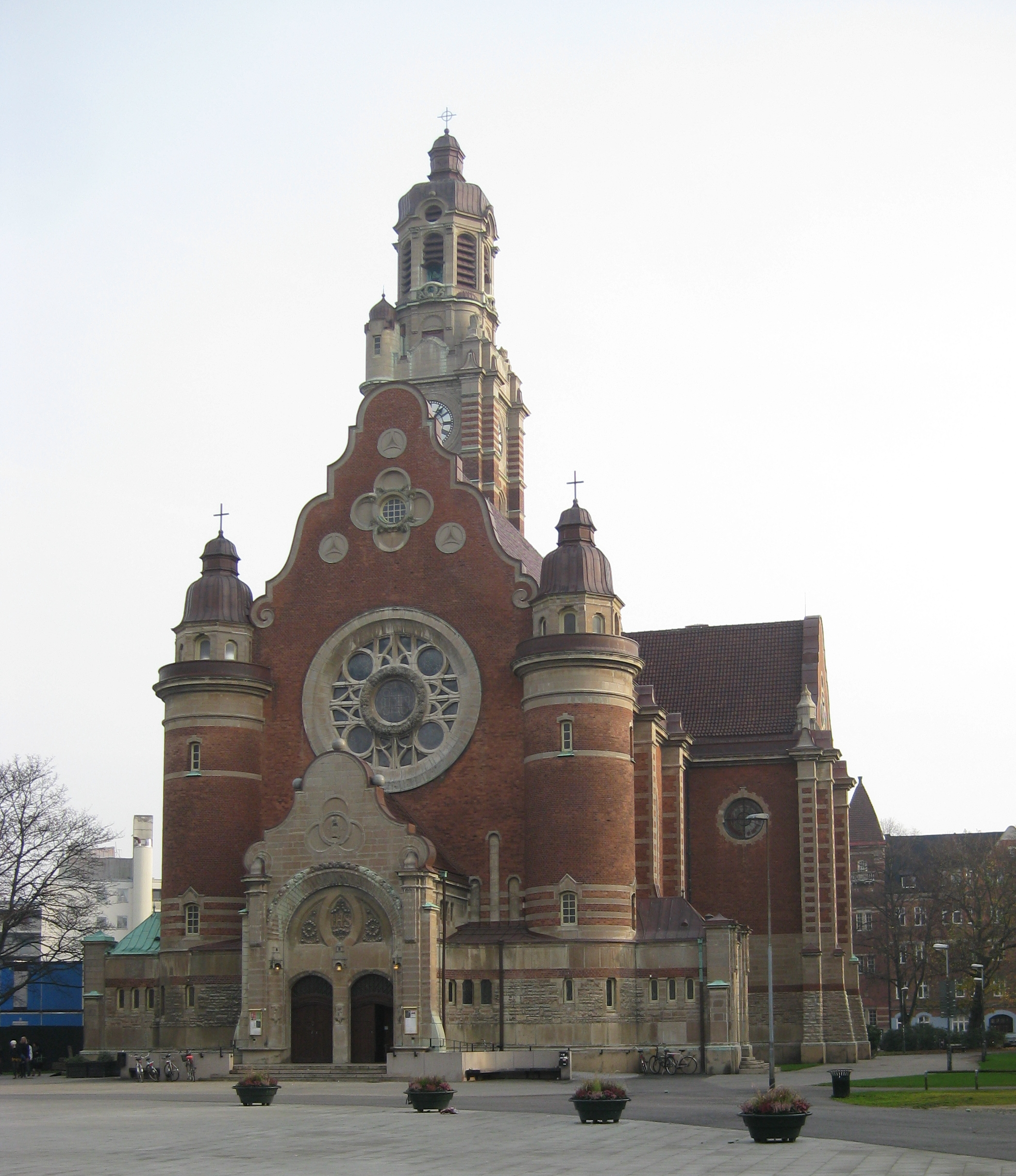 Sankt Johannes kyrka i Malmö